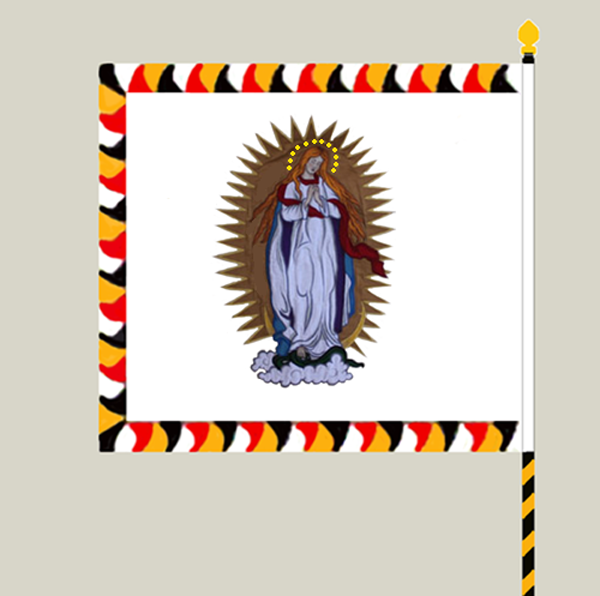 k.u.k. Regimentsfahne Rückrseite (ausgenommen die Infanterie-Regimenter Nr. 2, Nr. 4, Nr. 39, Nr. 41 und Nr. 57